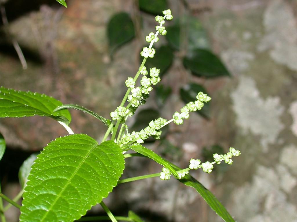 Mercurialis leiiocarpa：ヤマアイ 2002/01/09 和歌山県田辺市：Tanabe City. Wakayama Pref. Japan